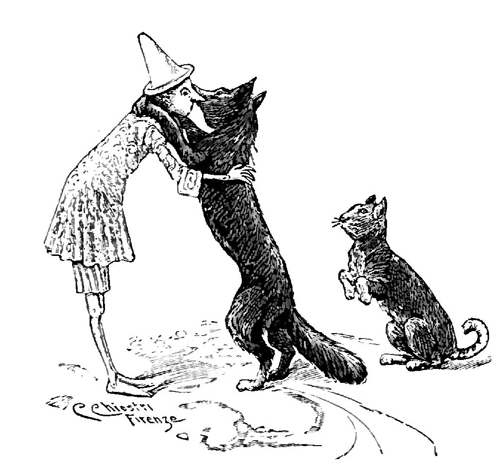 Illustrations from "Le avventure di Pinocchio, storia di un burattino", Carlo Collodi, Bemporad & figlio, Firenze 1902 (Drawings and engravings by Carlo Chiostri, and A. Bongini)